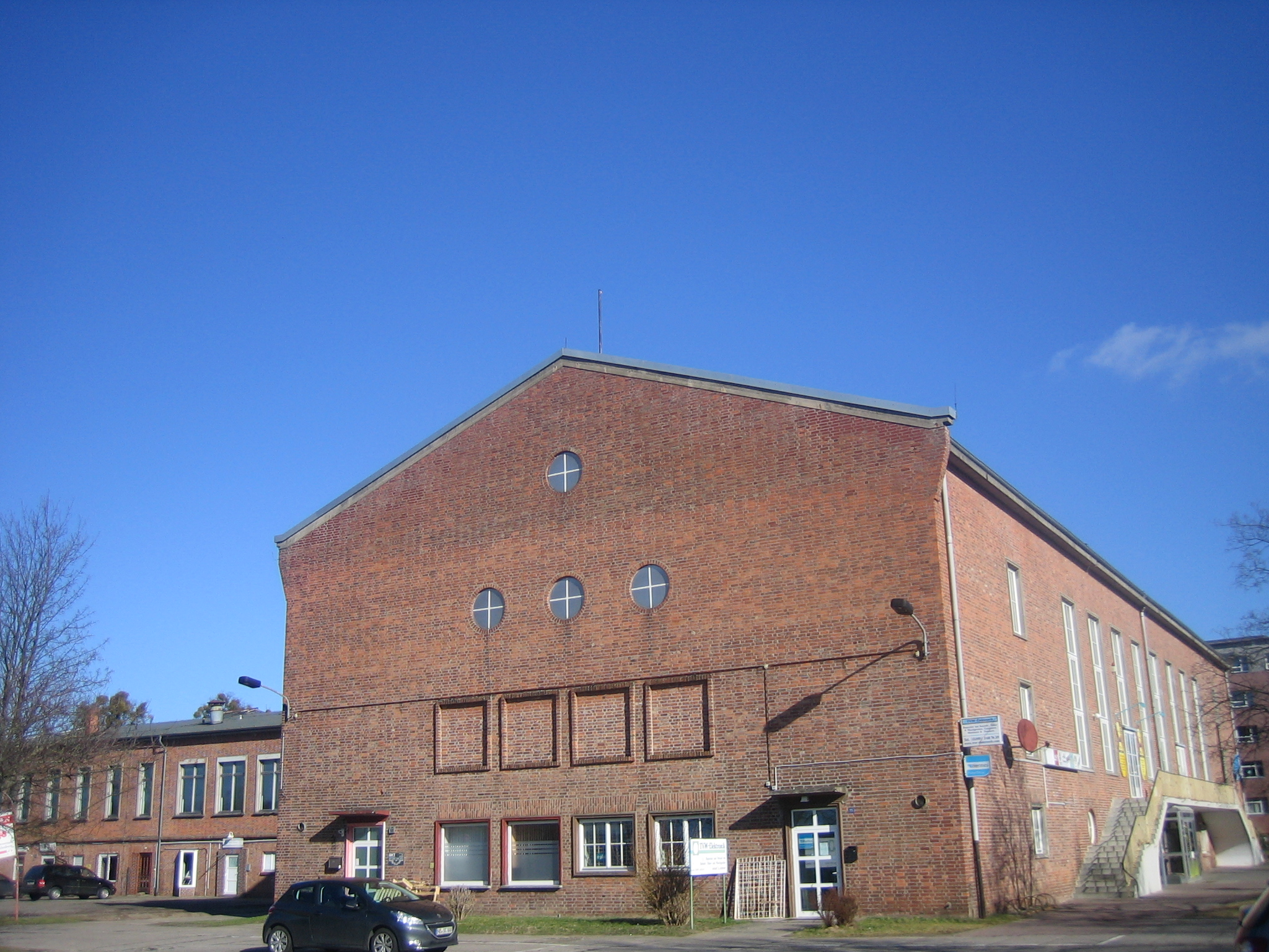 ehm. TVA und RWN, Kulturhaus, Lindenstraße 47 - 59 (ungerade fortlaufend), Neubrandenburg